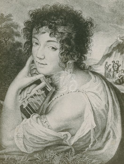 Maria Casentini, anonymer Stich, um 1800